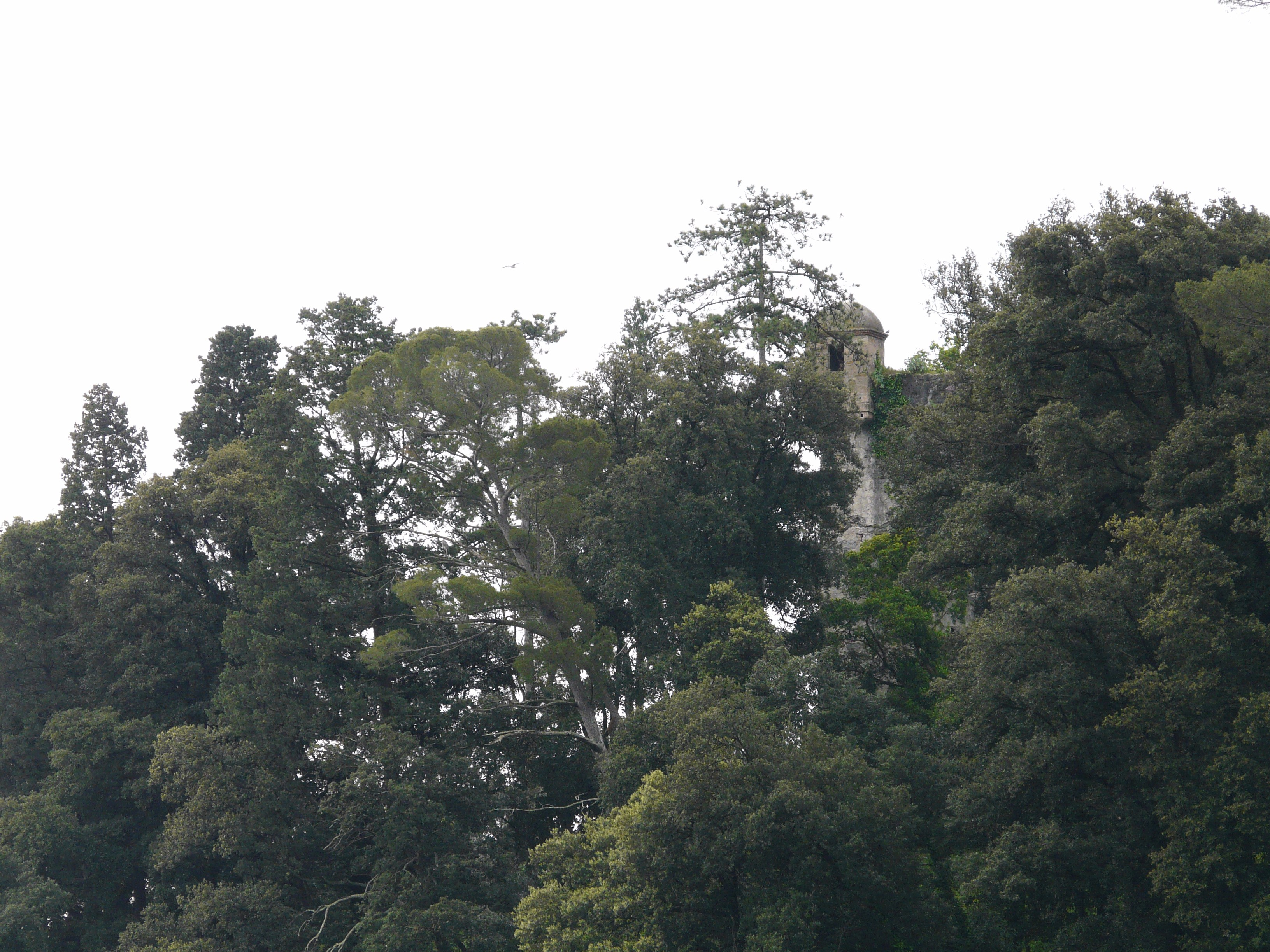 Castello di Punta Pagana presso la villa dell'Ordine di Malta, San Michele di Pagana, Rapallo, Liguria, Italia